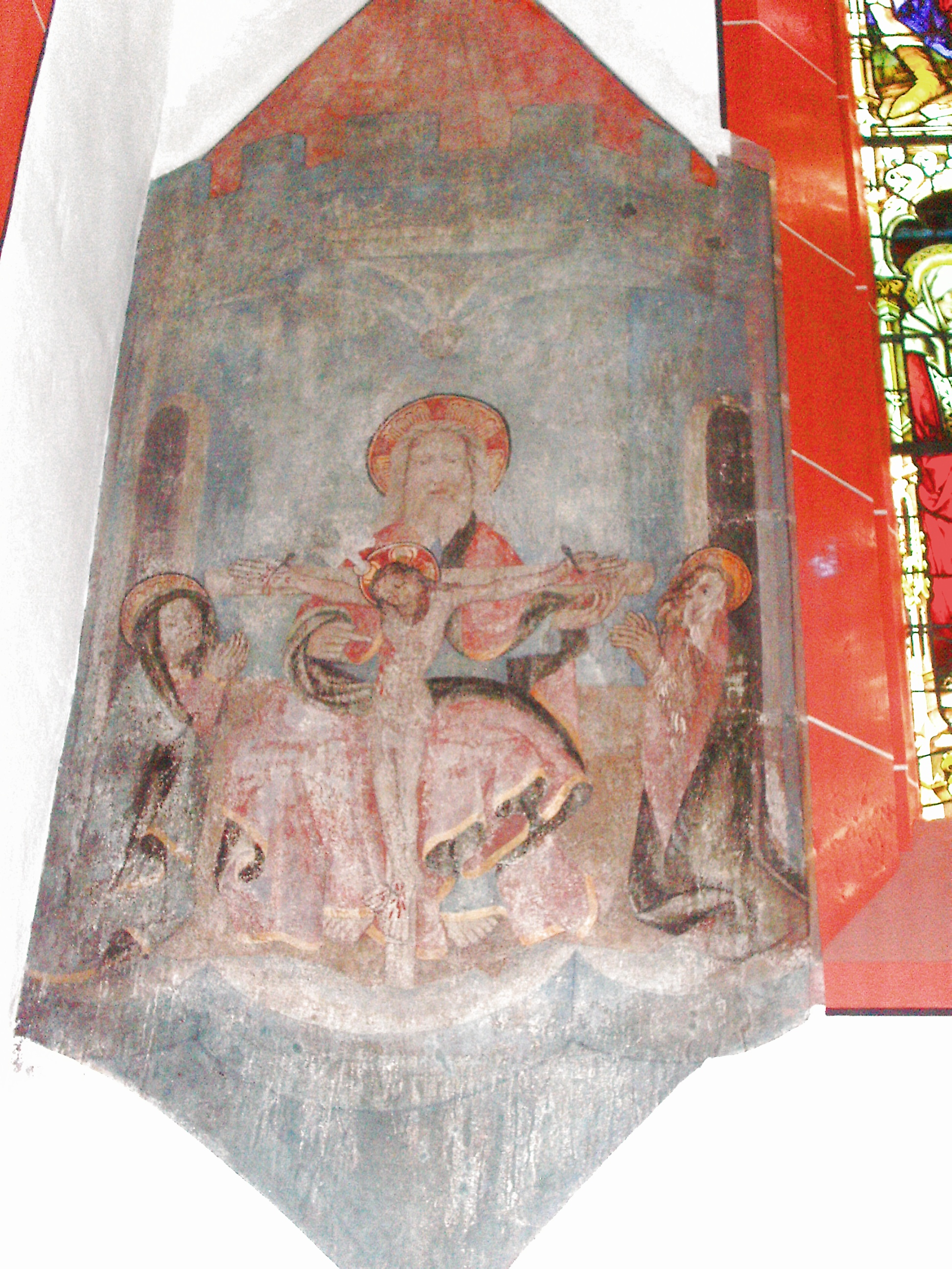 Gnadenstuhl, 1. Hälfte 15. Jahrhundert, Stiftskirche Neustadt a.d. Weinstrasse